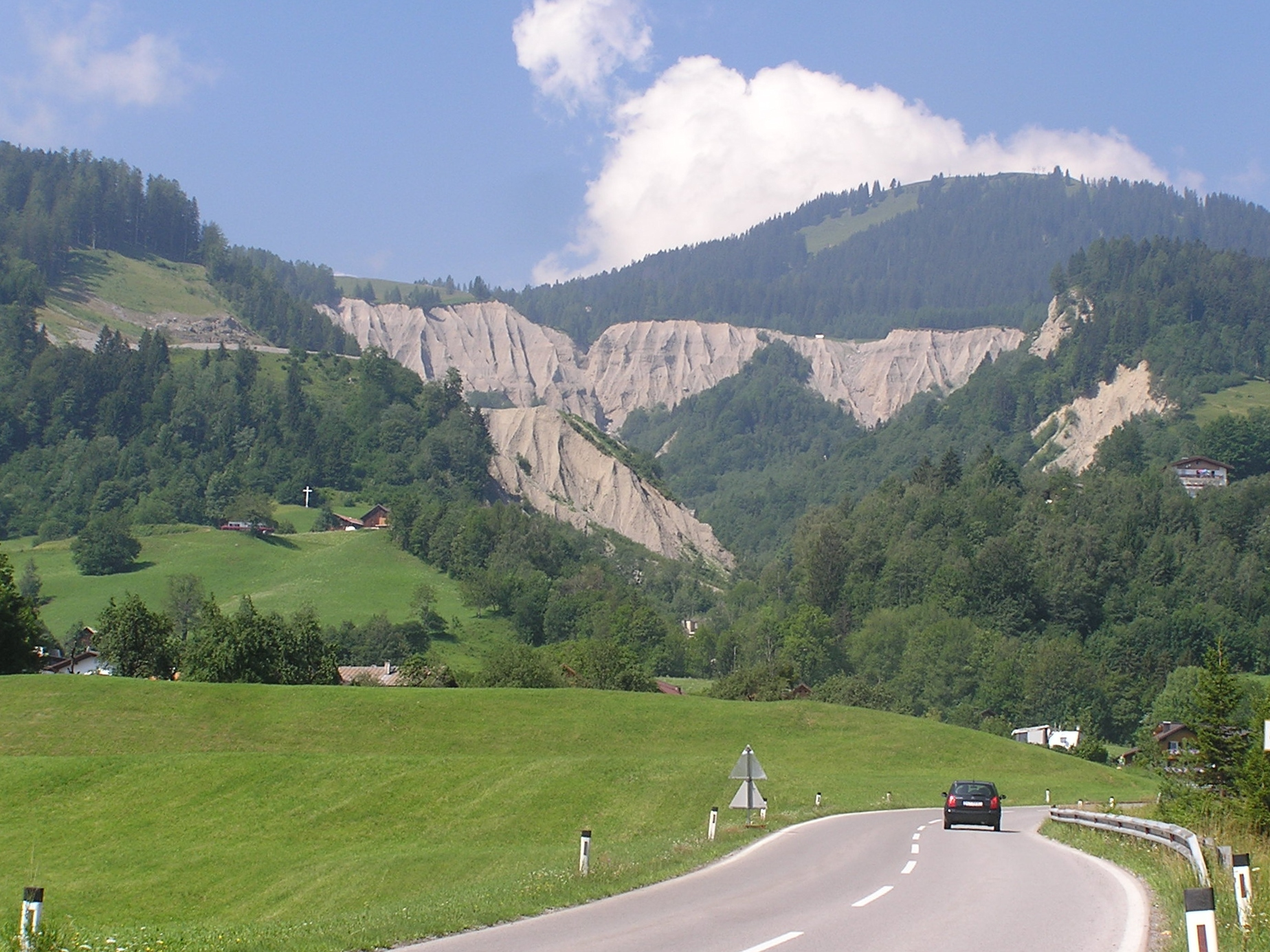 Bürserberg Murbruch Ort & Datum: 2006-07-16